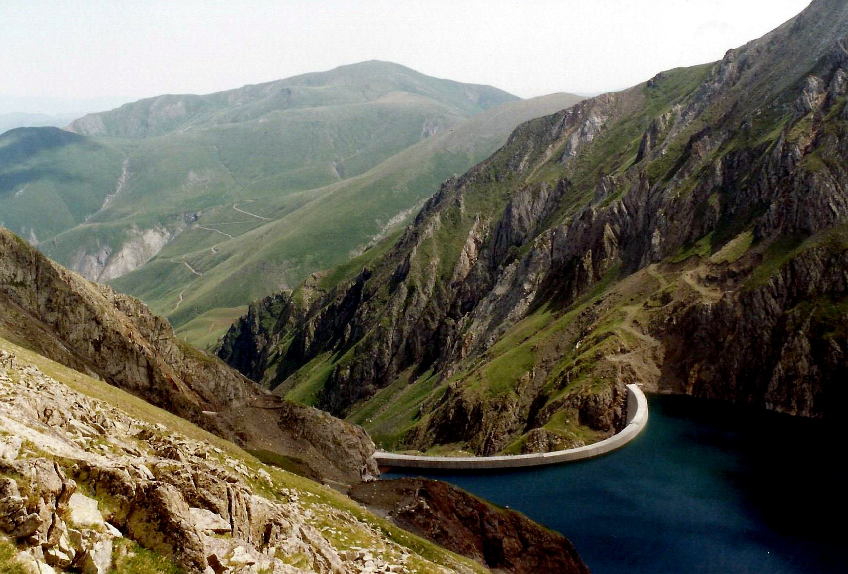 Estany i presa del pantà de Llauset (Montanui - Ribagorça) (Foto escanejada)